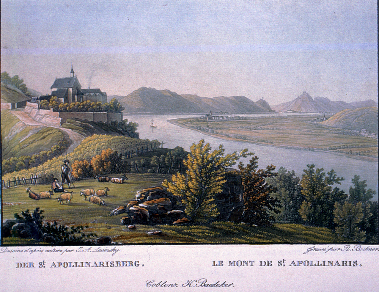 Altkolorierter Aquatintastich von R.Bodmer nach Vorlage von J.A.Lasinsky